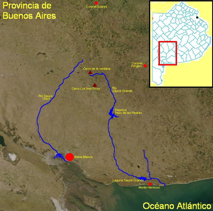 Esquema de curso del río Sauce Grande y del río Sauce chico, destacado sobre una imagen satelital de la Provincia de Buenos Aires (proveniente de la NASA) Y del sistema de Ventania (Sierra de la ventana)